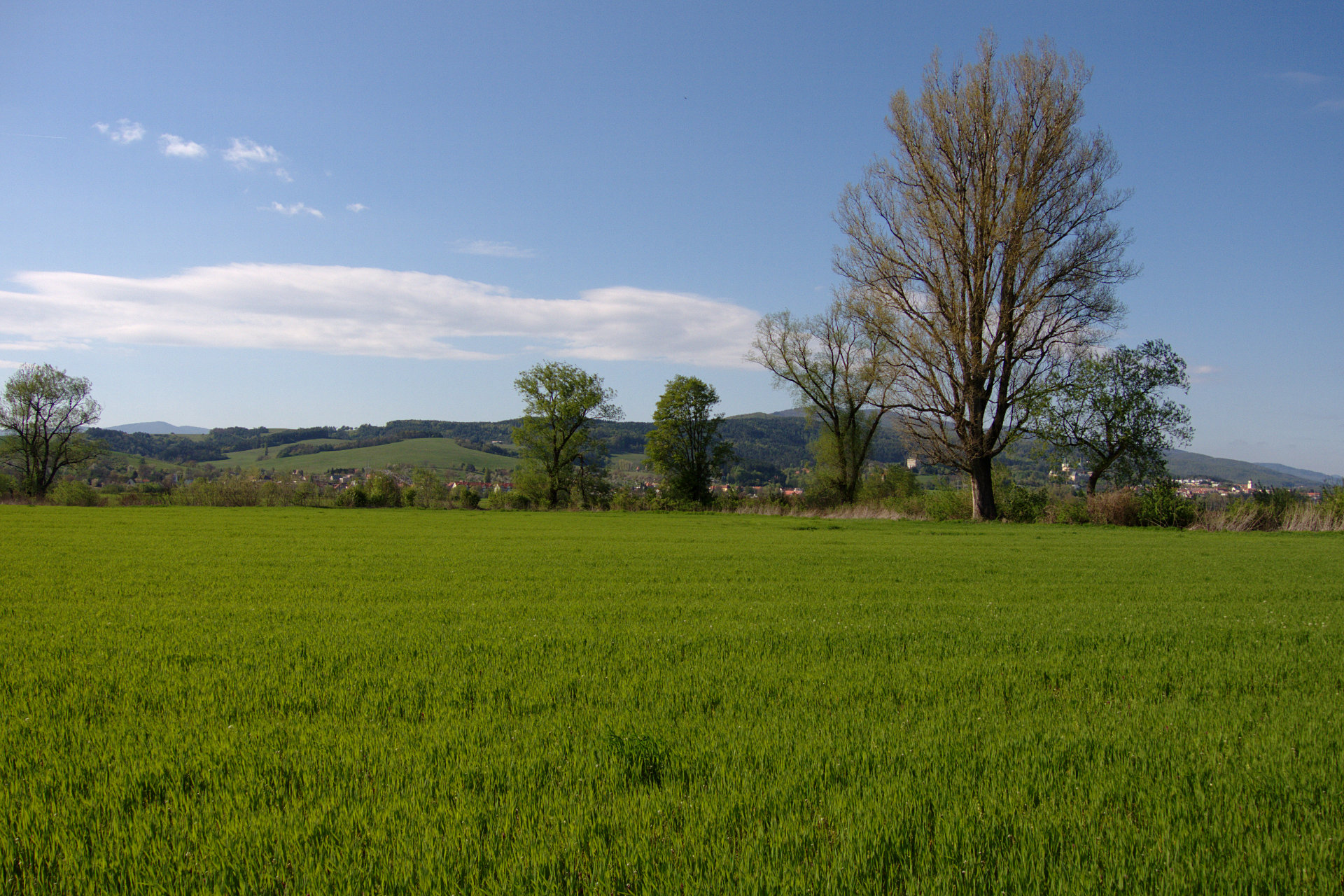 972 02 Opatovce nad Nitrou, Slovakia